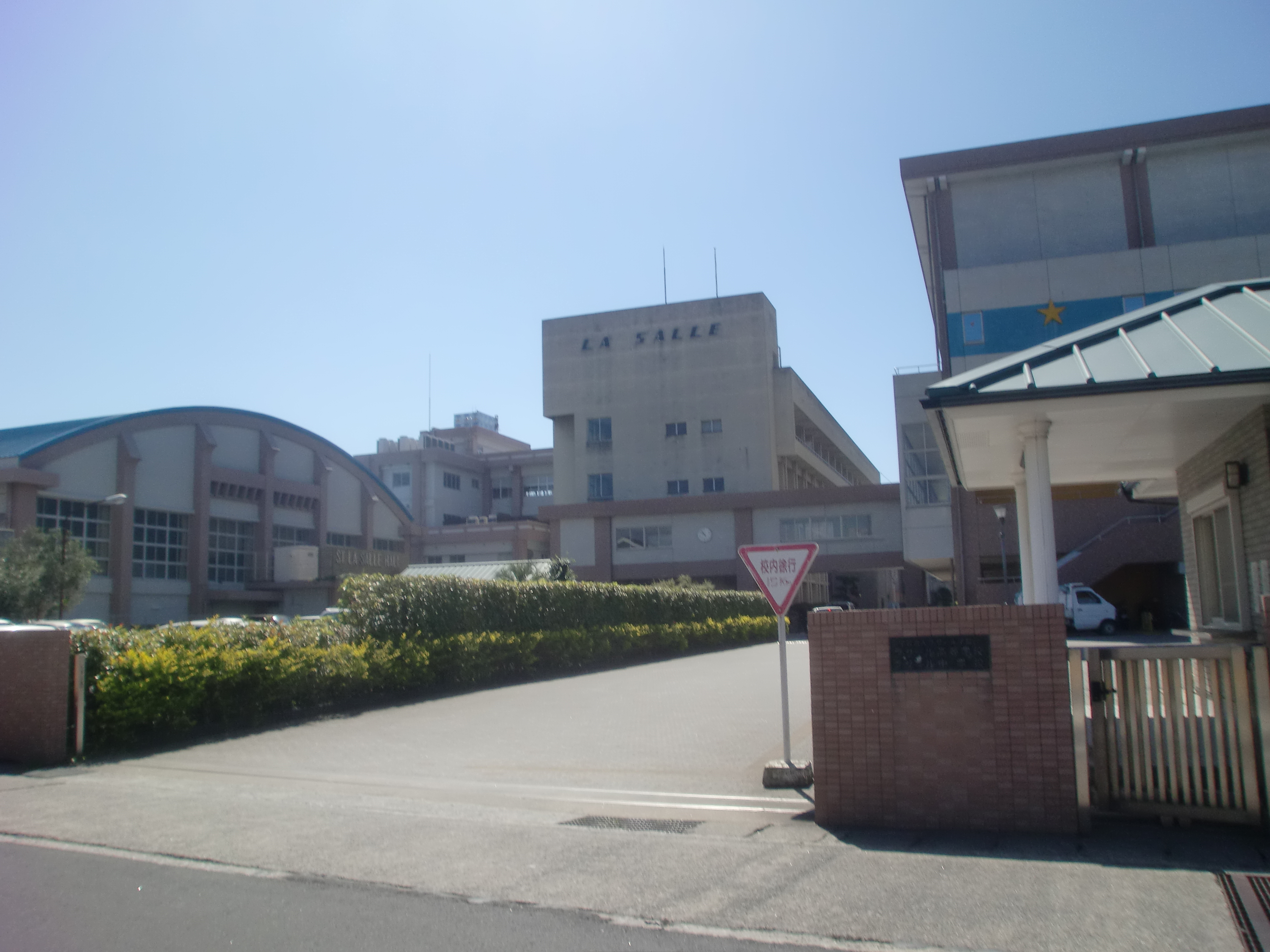 ラ・サール中学校・高等学校外観。